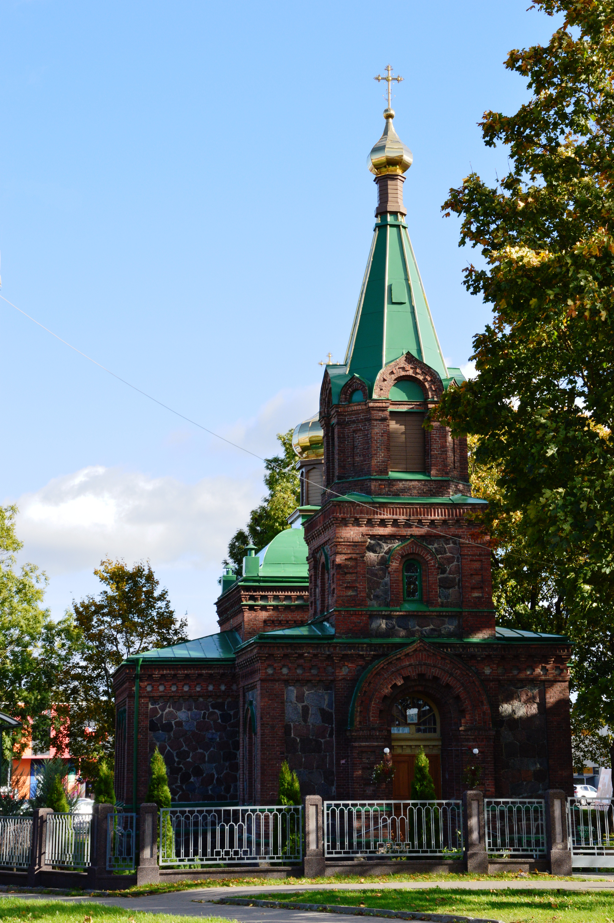 Jõhvi Issanda Ristimise kirik